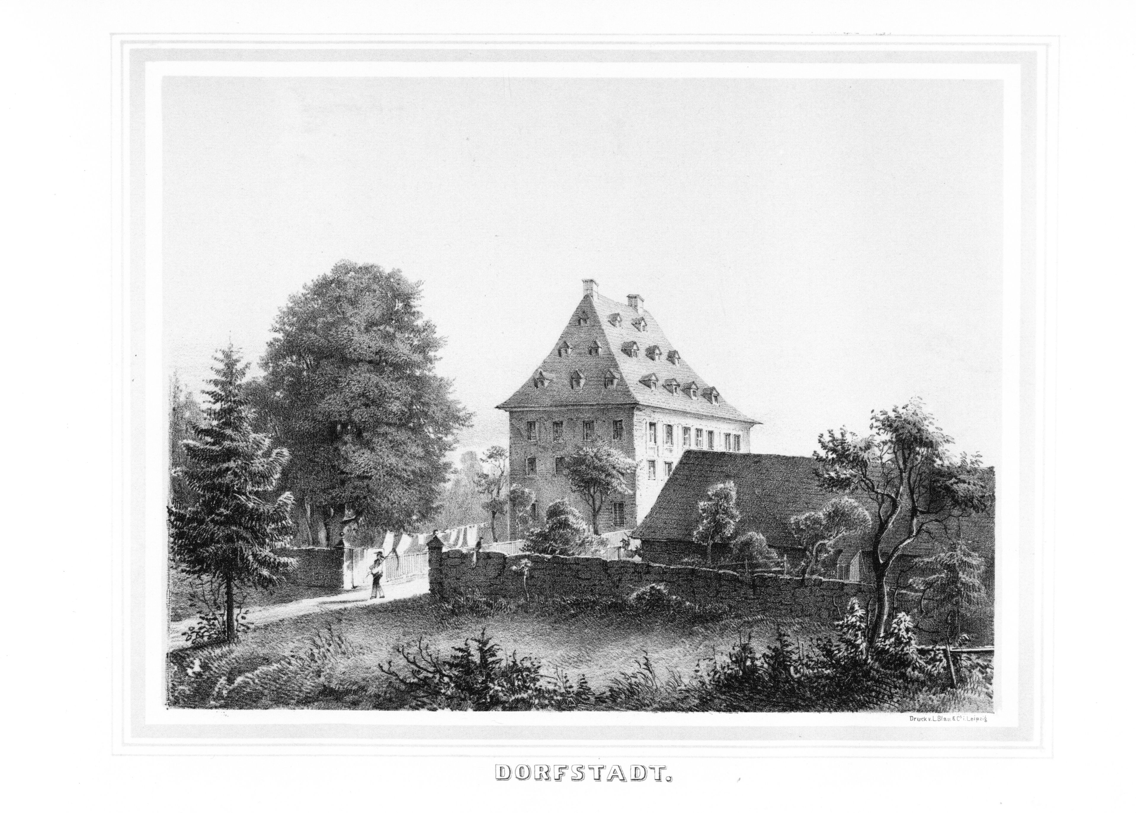 Dorfstadt aus: Album der Rittergüter und Schlösser im Königreiche Sachsen Voigtländischer Kreis Section: V